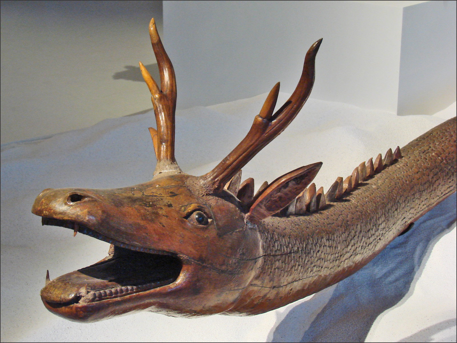 Karam Dineshwar Singh, Paphal Bois 2002 Indira Gandhi Rashtriya Manav Sangrahalaya, Bhopal Pakhamba est une divinité représentée sous la forme d'un serpent (Pophal) au corps de python avec une tête de cerf et des épines dorsales. (communauté Meitei de Manipur) Image de l'exposition "Autres Maîtres de l'Inde, créations contemporaines des Adivasi " Musée du Quai Branly Paris